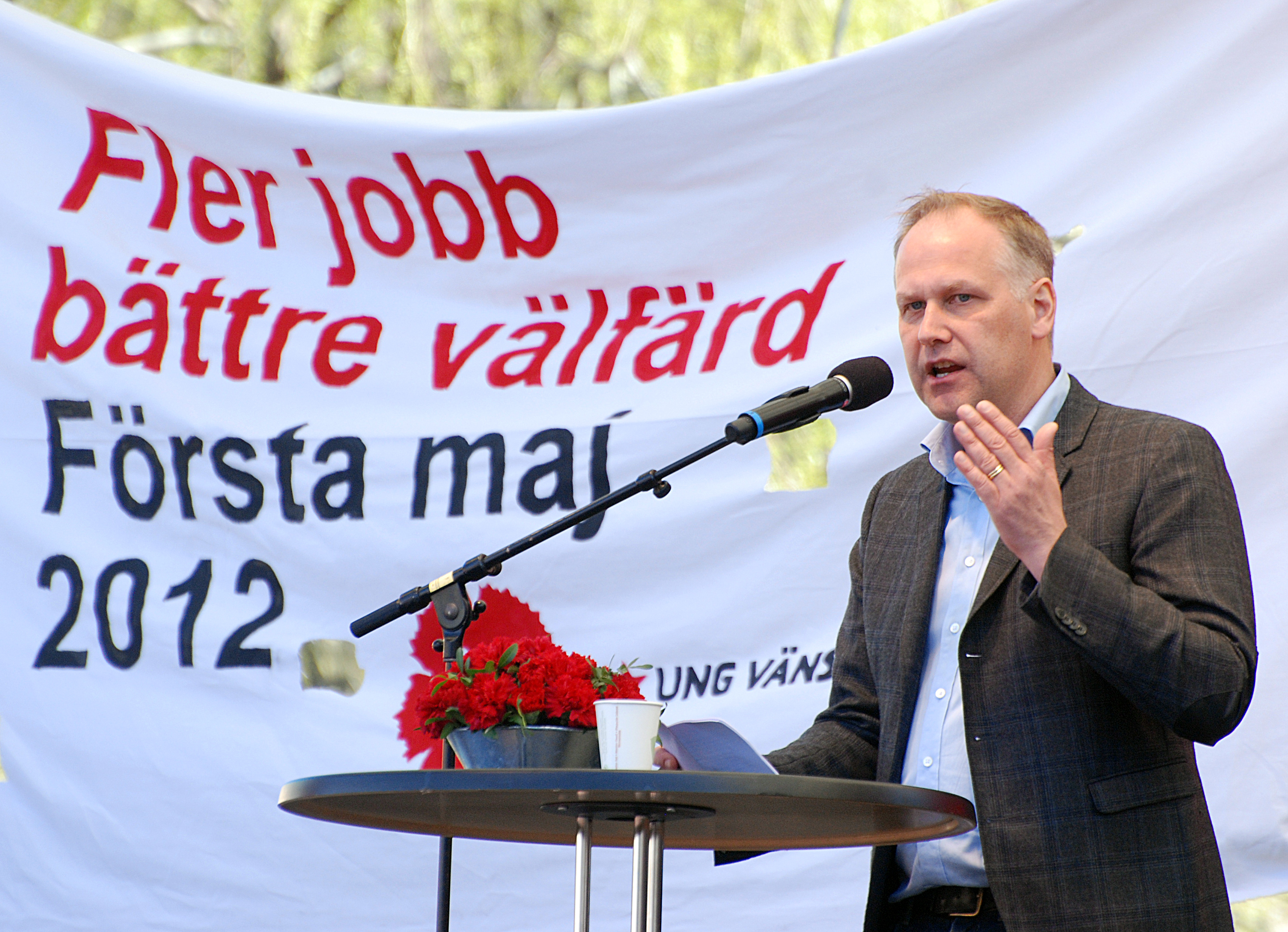 Jonas Sjöstedt i Kungsträdgården första maj 2012